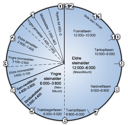 Steinalderen i Norge: Laget av Jon Harald Søby fra :Bilde:Tidsskive.JPG av Hallvard Straume.